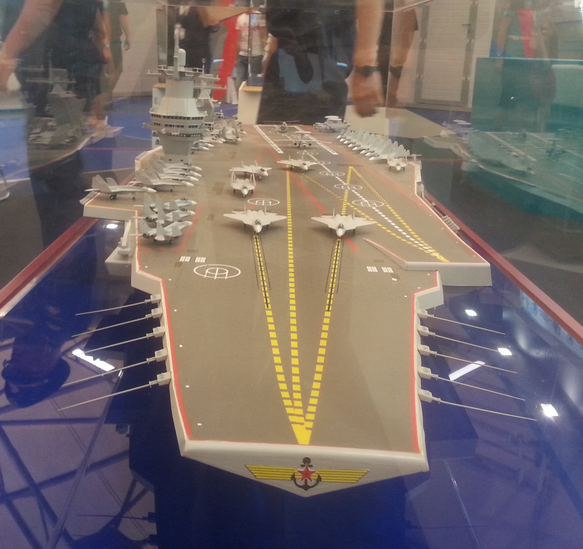 Макет авианосца проекта 23000Е на выставке «Армия 2015»